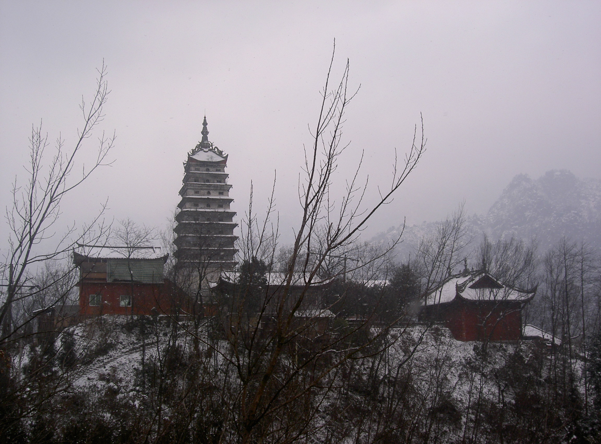 塔